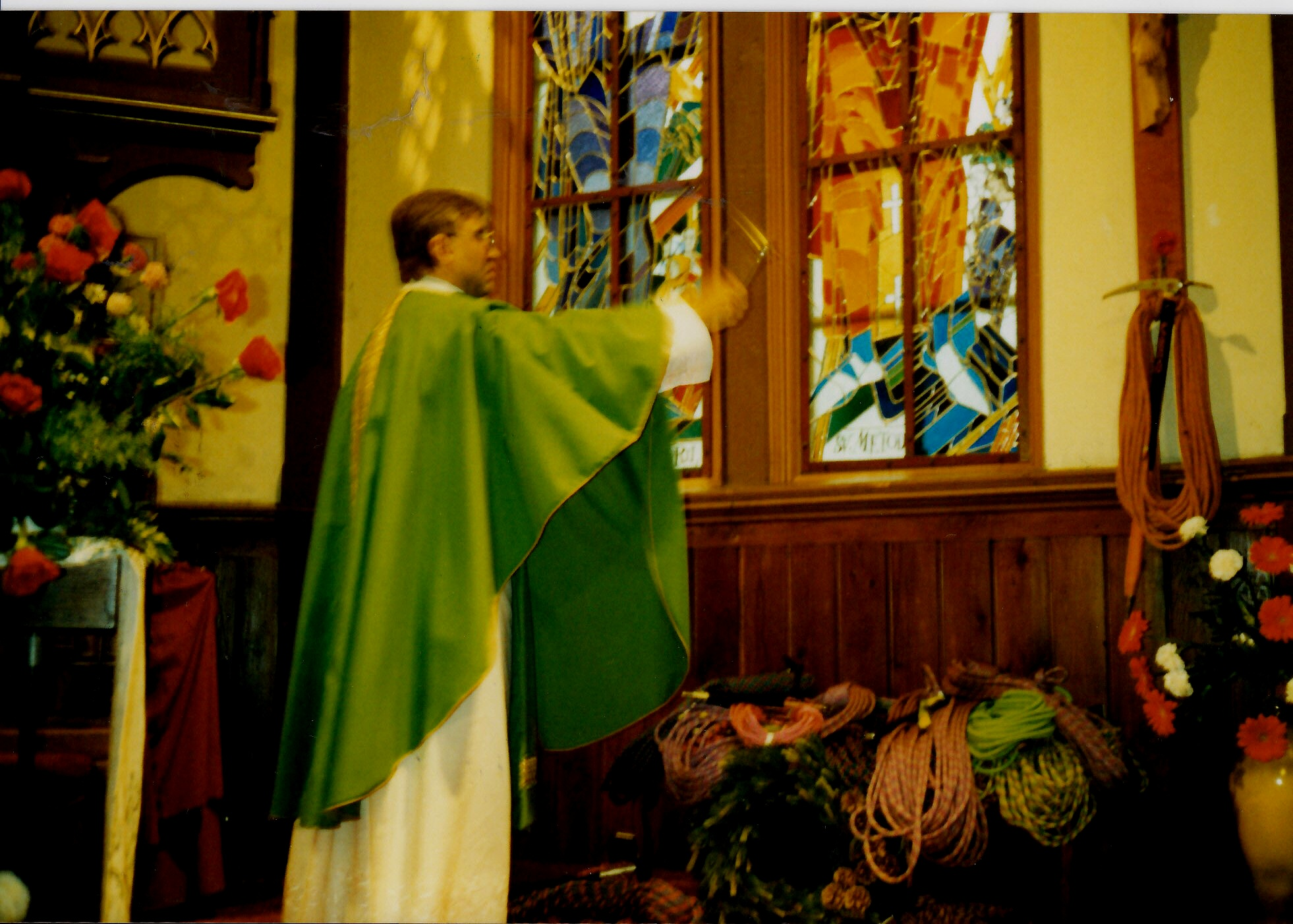 V roku 1996 po prvý raz v v r.k. kosole v Starom Smokovci kňaz posvätil pred letnou sezónou výstroj horských vodcov